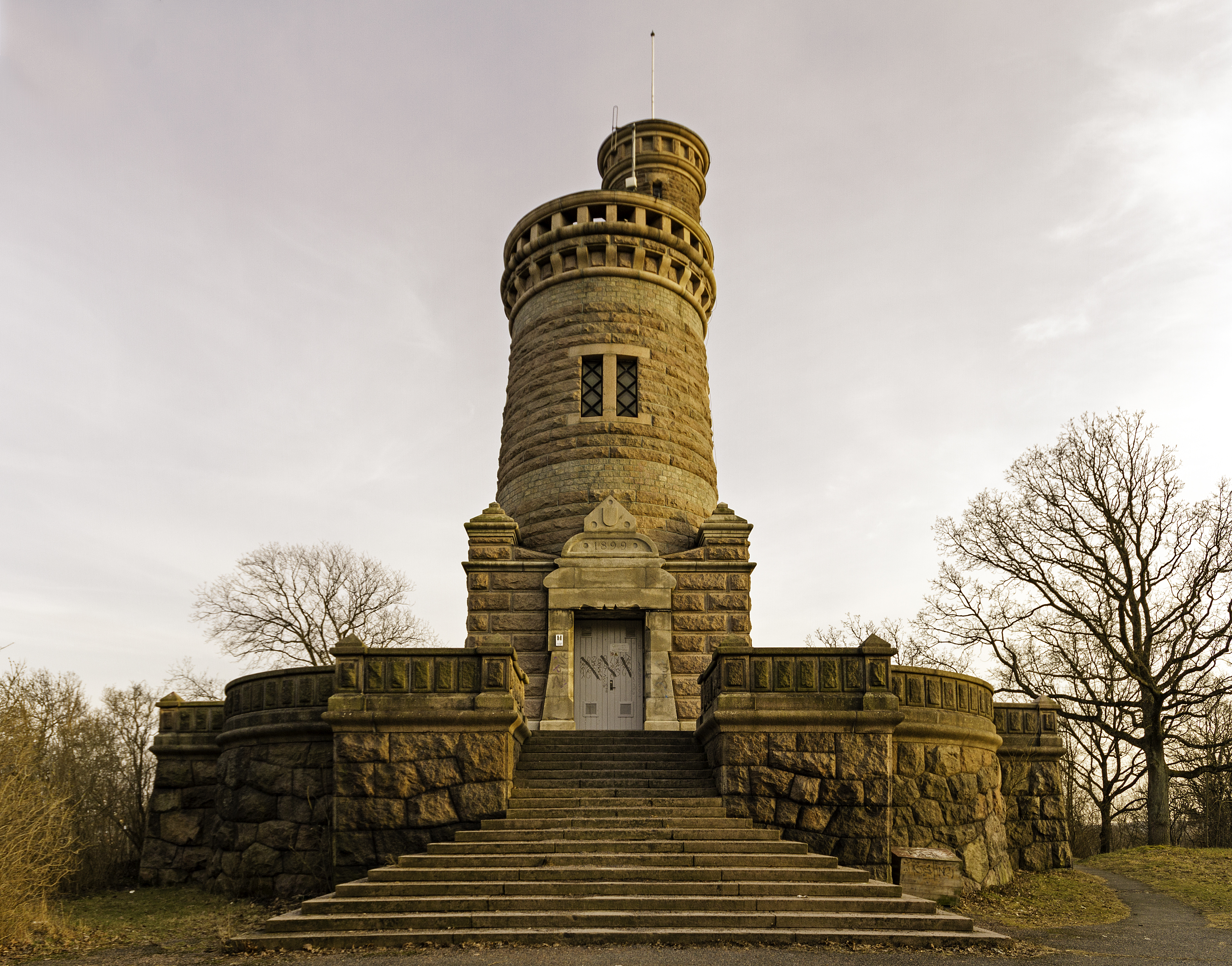 Utsiktstorn, f.d. vattentorn i Slottsskogen, Göteborg. Adrian Crispin Peterson, 1899.